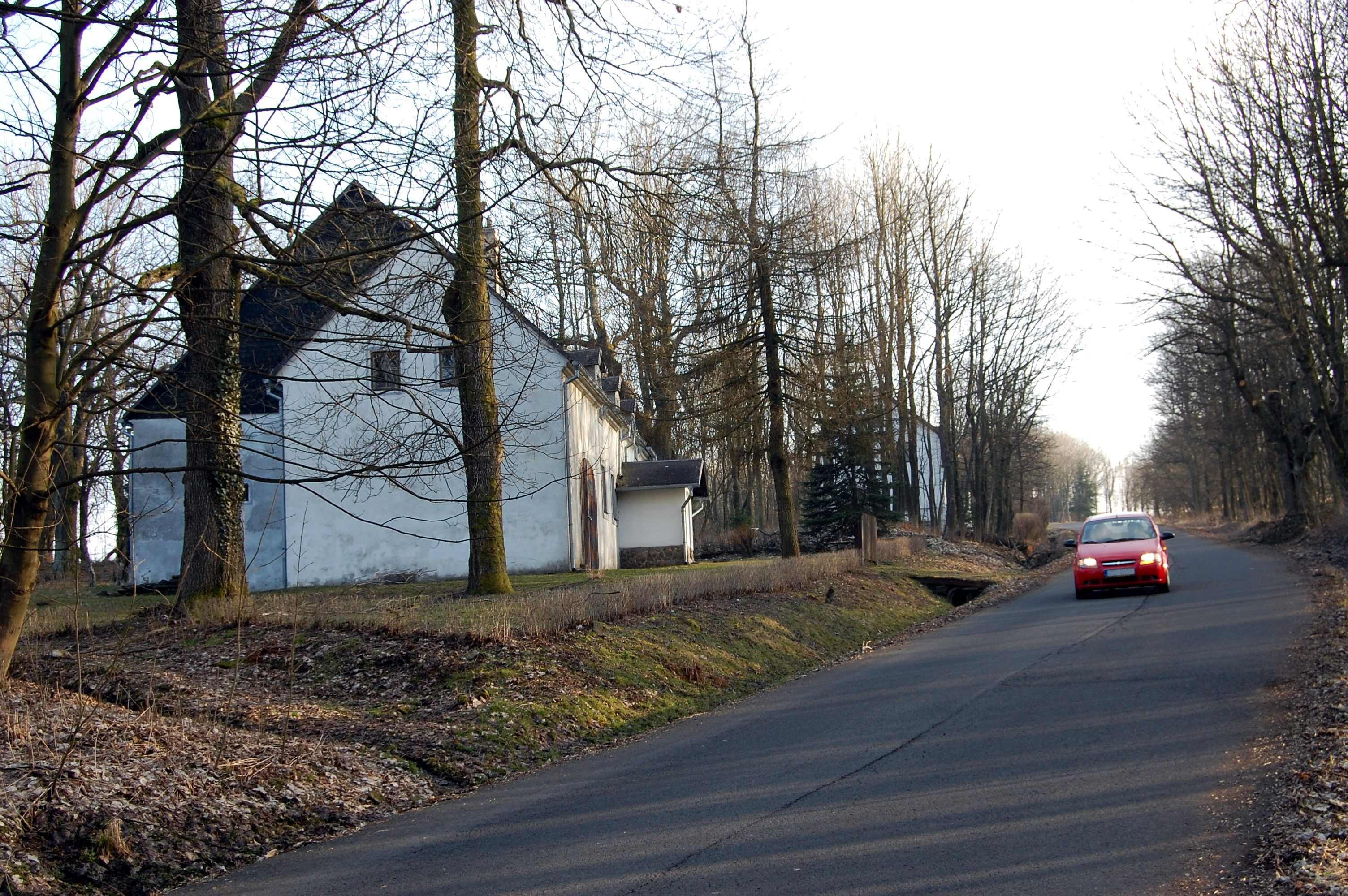 Větrov v Krušných horách